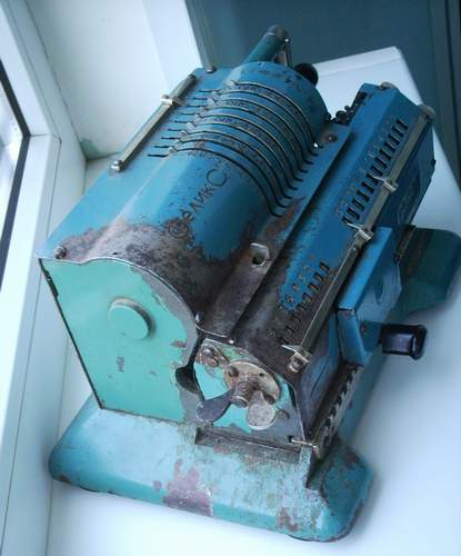 Mechanical calculator